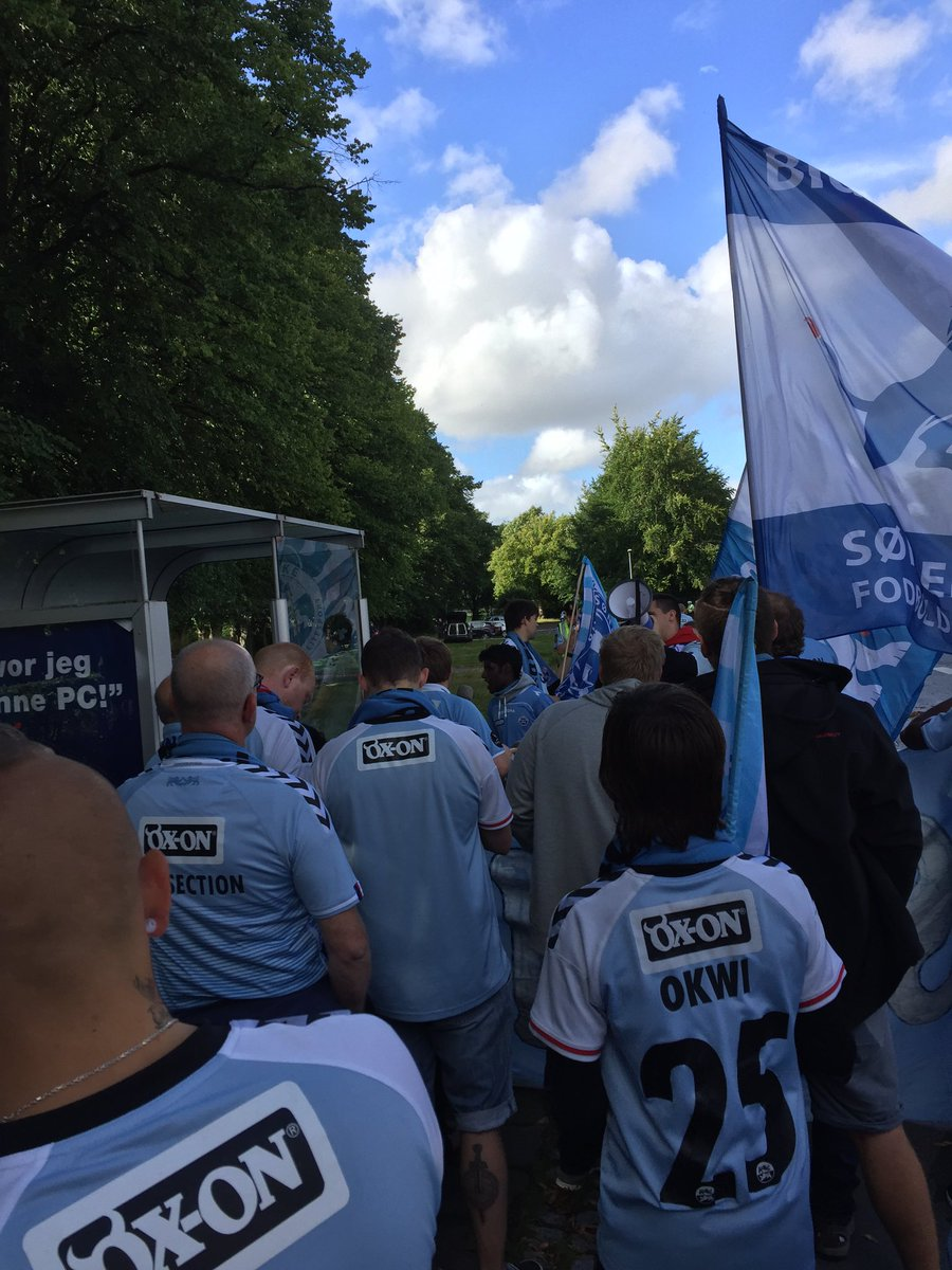 SønderjyskE fan march, før Europa League kvalkampen imod Zaglebie Lubin fra Polen, d. 4. august 2016.